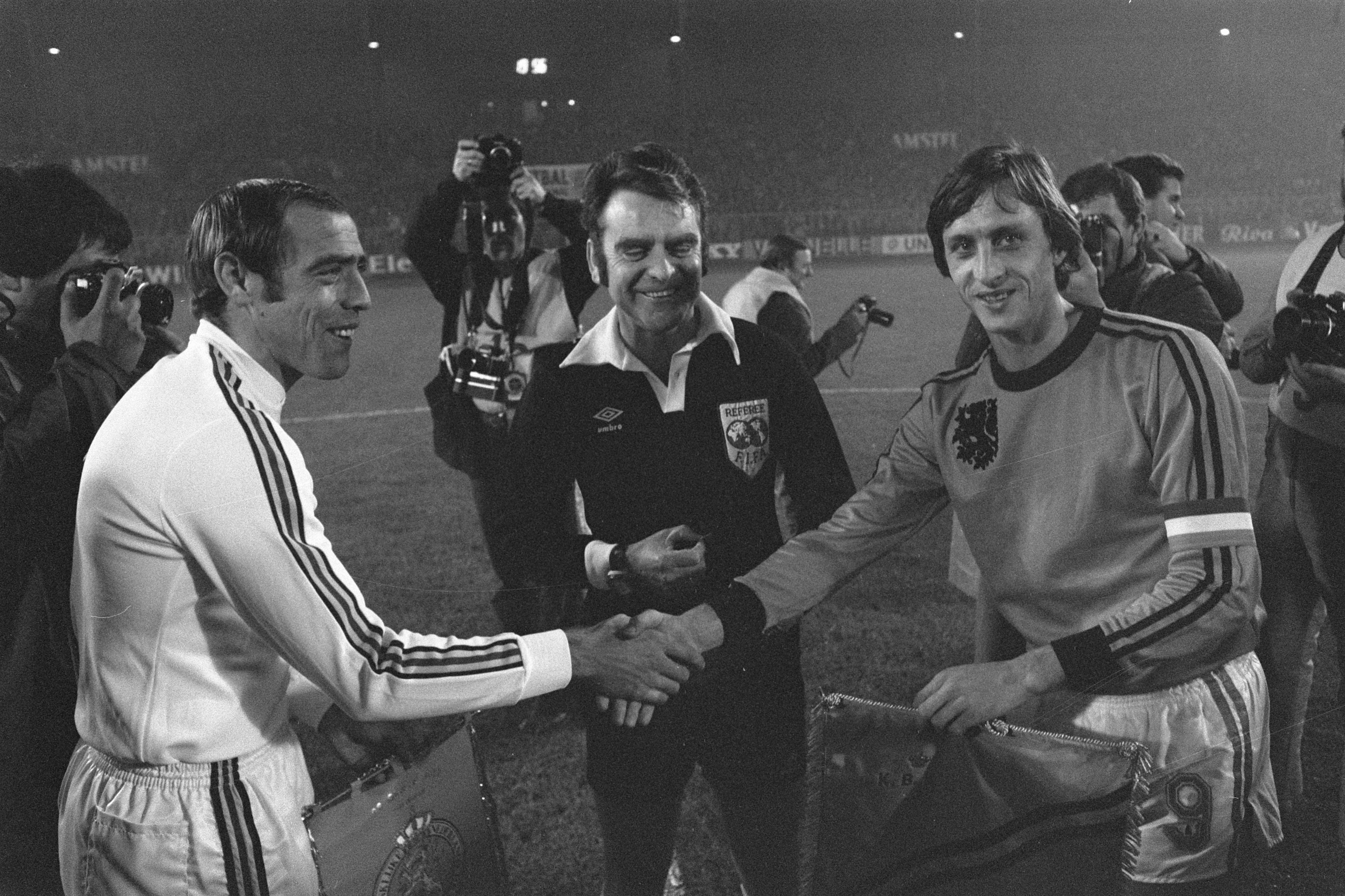 Collectie / Archief : Fotocollectie Anefo Reportage / Serie : [ onbekend ] Beschrijving : Nederland tegen Belgie 1-0, toss Datum : 26 oktober 1977 Locatie : België, Nederland Trefwoorden : sport, voetbal Fotograaf : Verhoeff, Bert / Anefo Auteursrechthebbende : Nationaal Archief Materiaalsoort : Negatief (zwart/wit) Nummer archiefinventaris : bekijk toegang 2.24.01.05 Bestanddeelnummer : 929-4099